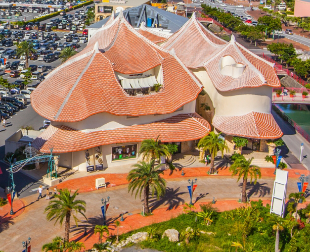 沖縄県北谷町美浜にあるアートコロニーアカラの画像です。